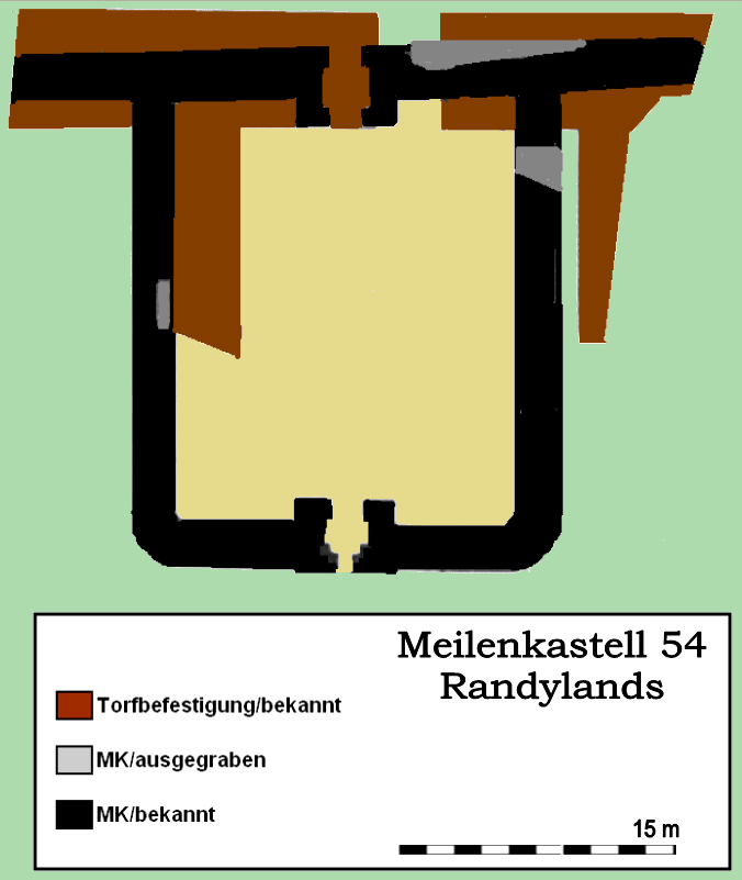 Befundskizze Meilenkastell 54 Randylands, Hadrianswall (GB).